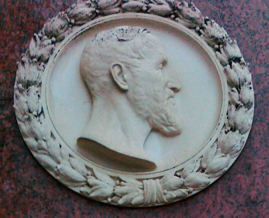 Grabrelief Josef von Kühn, Gründer und Präsident des Ersten Wiener Volksküchenvereines (1833 - 1913), Österreichisches Biographisches Lexikon Band 4, Wien 1969, S. 322. Relief erstellt von Josef Kassin (1856 - 1930)